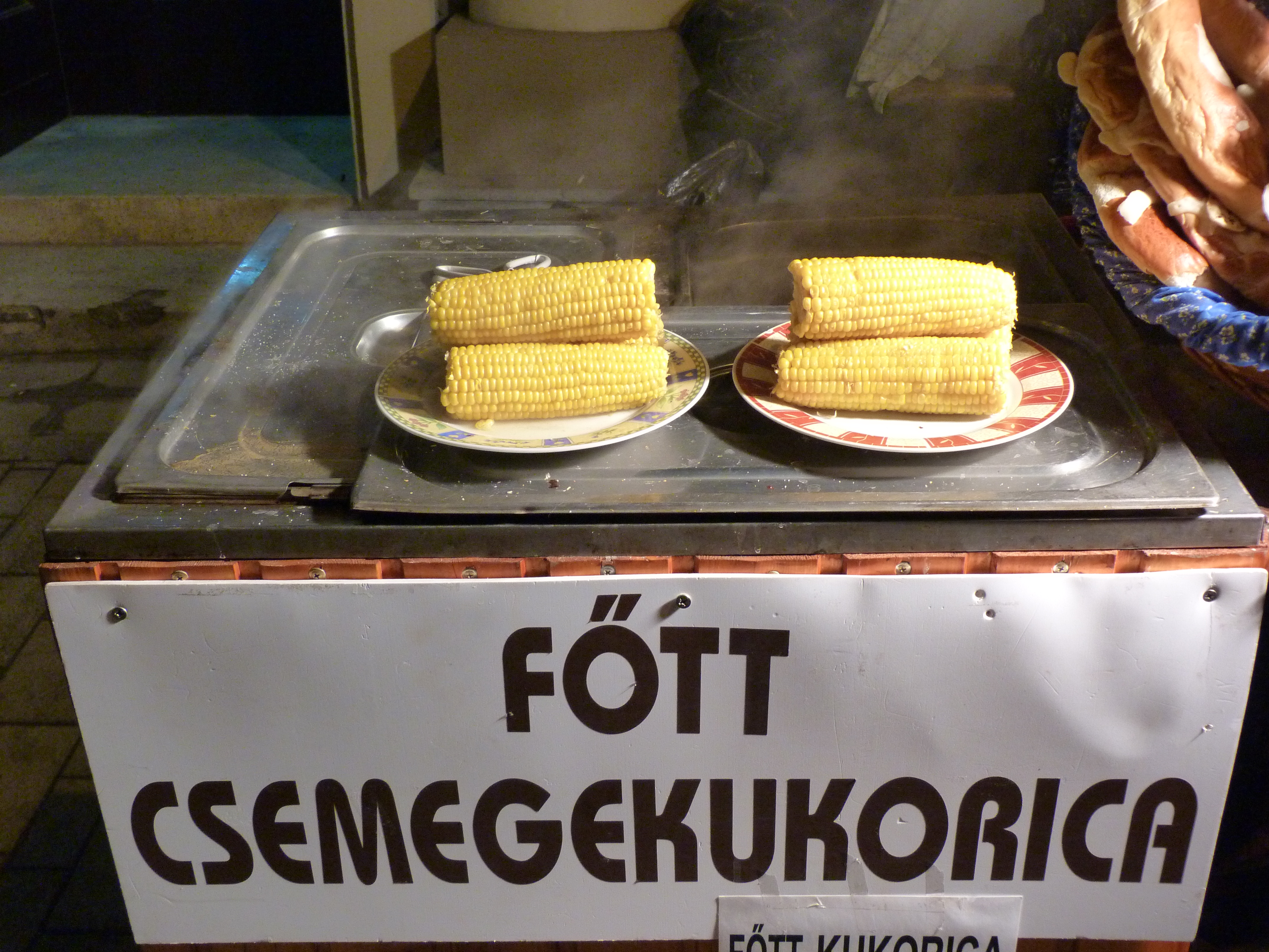 A felvétel 2015. február 7-én szombaton készült Miskolcon. Miskolci Kocsonyafesztivál. ©© Derzsi Elekes Andor, Budapest, 2015, Published in the Metapolisz DVD line. You are authorised to use this photo under Creative Commons – even for commercial, for profit purposes. The vid must be attributed to Derzsi Elekes Andor. All of the photos and vids in the Metapolisz DVD line are under Creative Commons and can be used even for commercial – for profit – purposes. Recommended Citation Derzsi Elekes Andor: Metapolisz DVD line